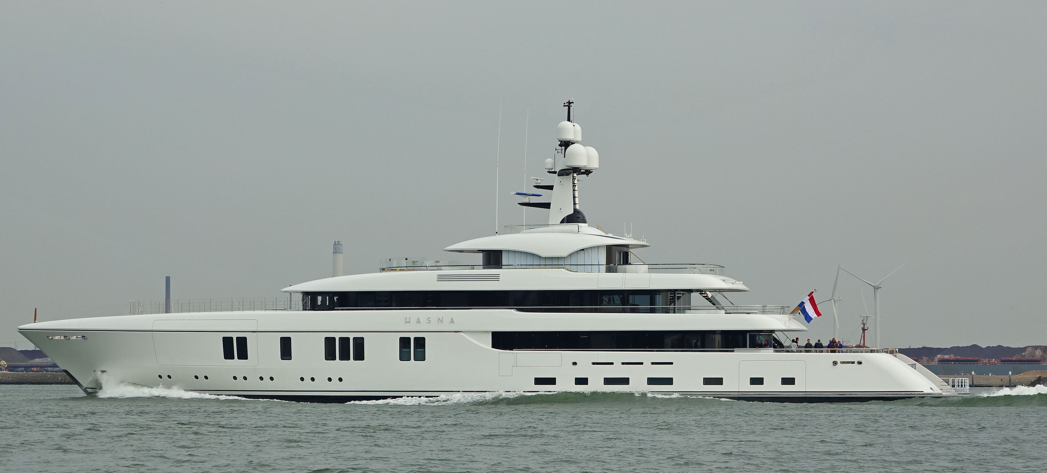 Terug naar de Waalhaven in Rotterdam na proefvaart op de Noordzee 27-6-2017. HASNA 73 meter lang. is gebouwd bij Feadship de Kaag .